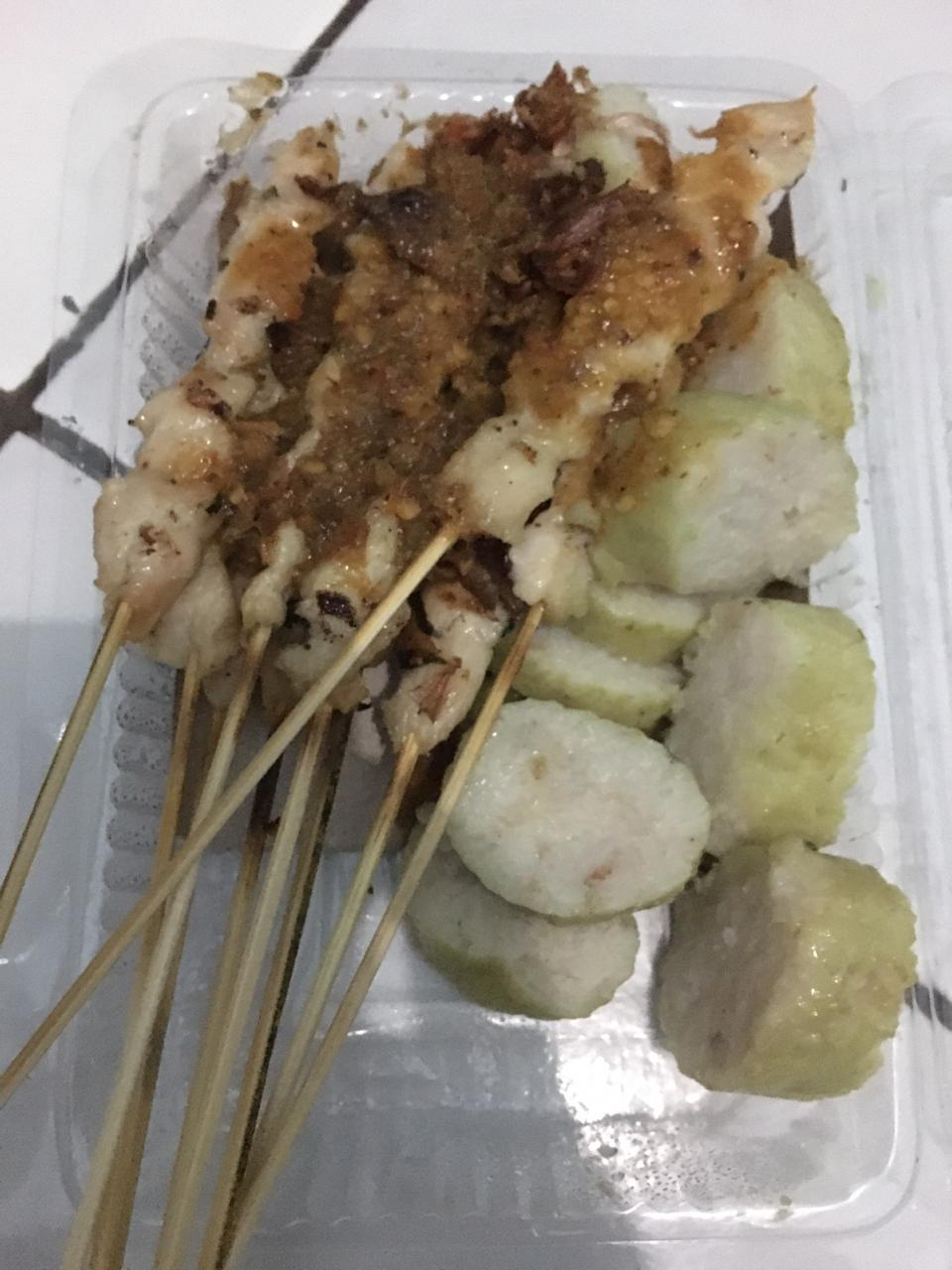 Sate Taichan khas Semarang